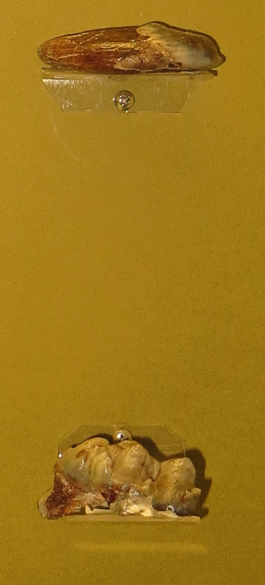 Fossil - took the picture at Museo Scienze Naturali di Faenza